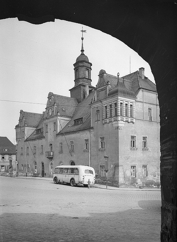 Original image description from the Deutsche Fotothek Lommatzsch. Rathaus